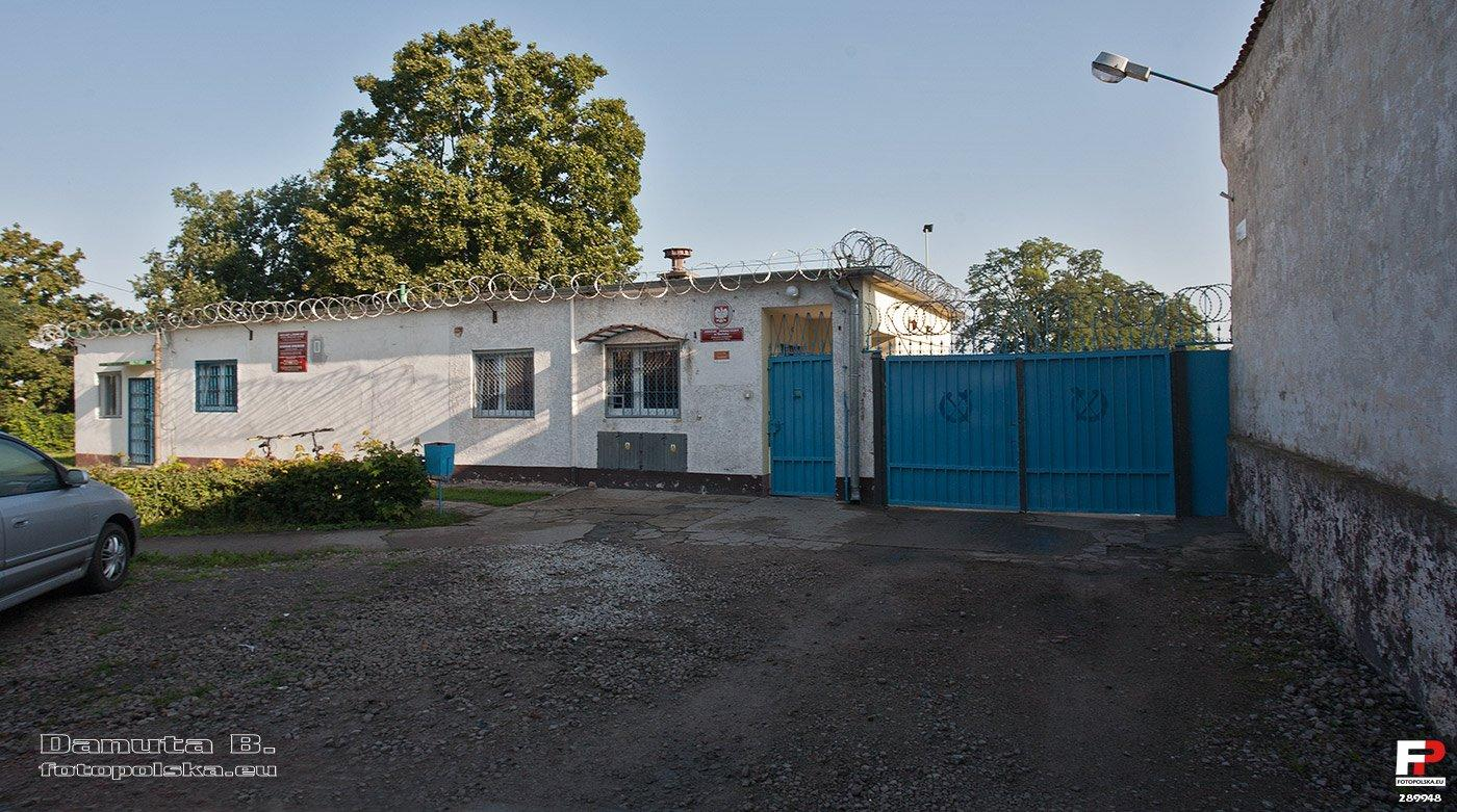 Główna brama prowadząca do Zakładu Karnego, który znajduje się na terenie dawnego więzienia (1933-45). Wiem od panów pełniących służbę w wartowni, że z dawnych budynków niewiele pozostało.